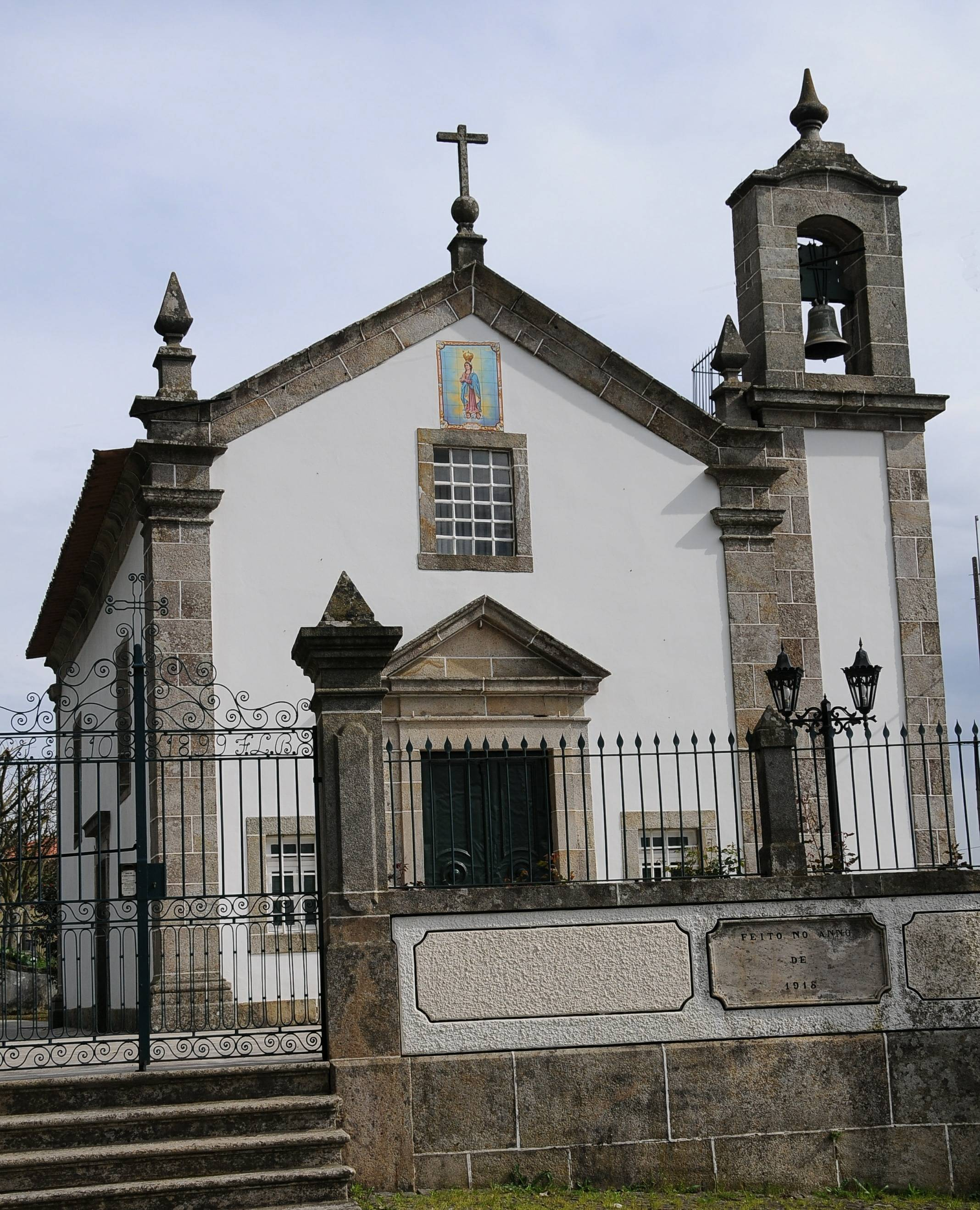 Senhora da Esperanca Chapel, in Pousa Barcelos